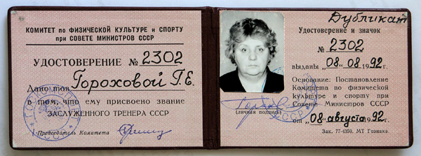 Дубликат удостоверения к званию "Заслуженный тренер СССР". Выдан в 1992 году Галине Гороховой.